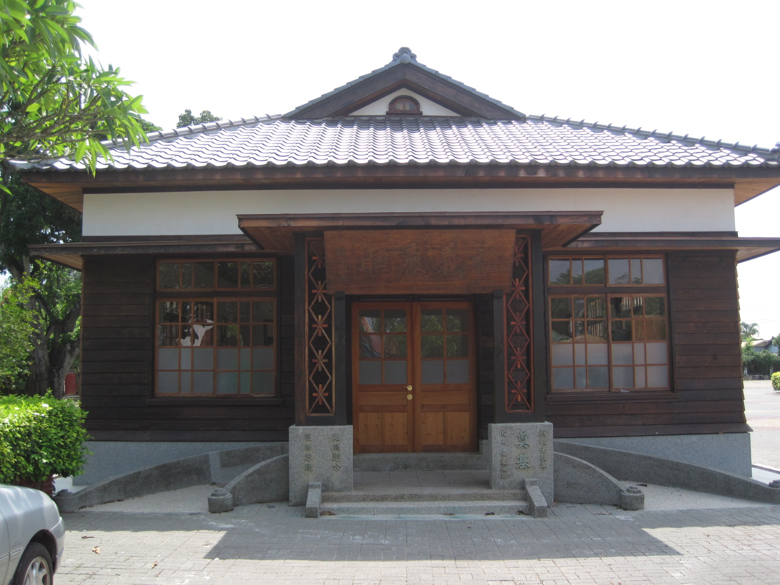 中文（台灣）: 臺灣臺南市後壁區安溪國小原辦公廳